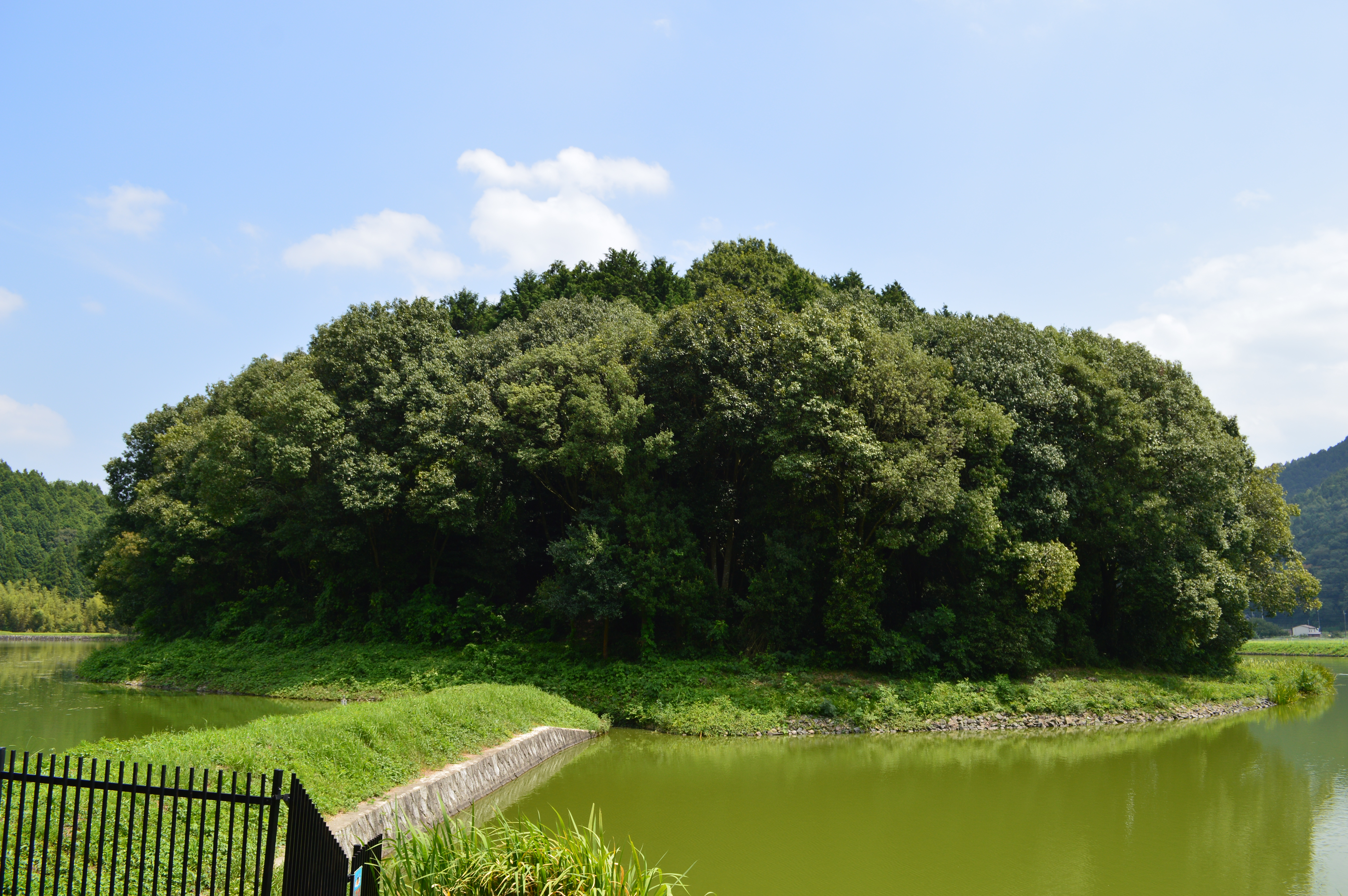 雲部車塚古墳 後円部